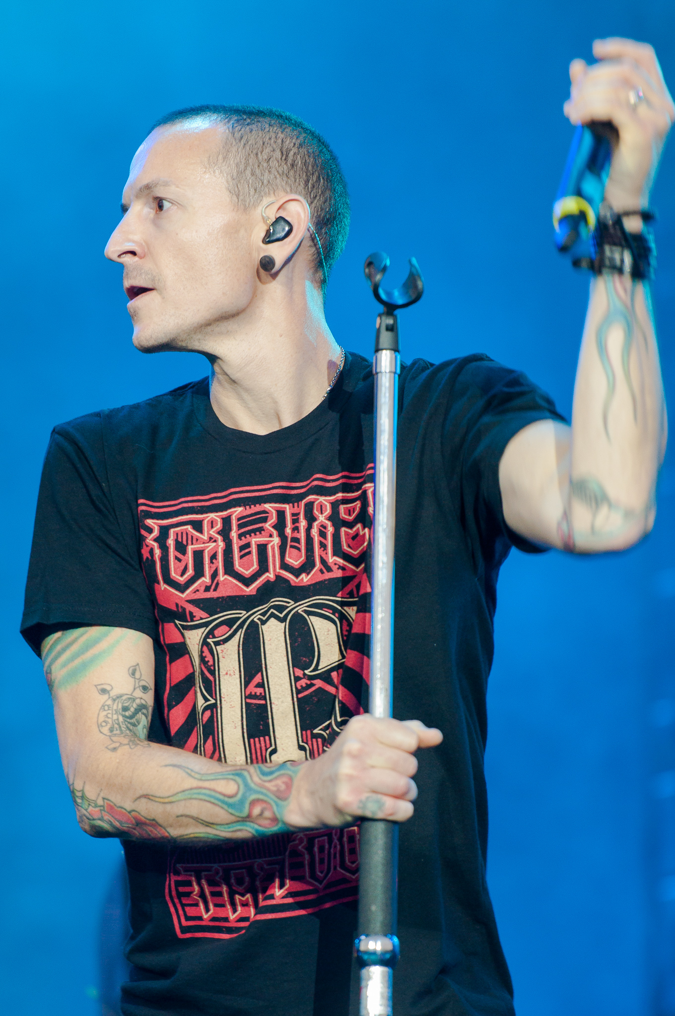 ARGO-Konzerte,Centerstage,Chester Bennington,Konzert,Linkin Park,Livekonzert,Livemusik,Musik,RiP,Rock im Park 2014